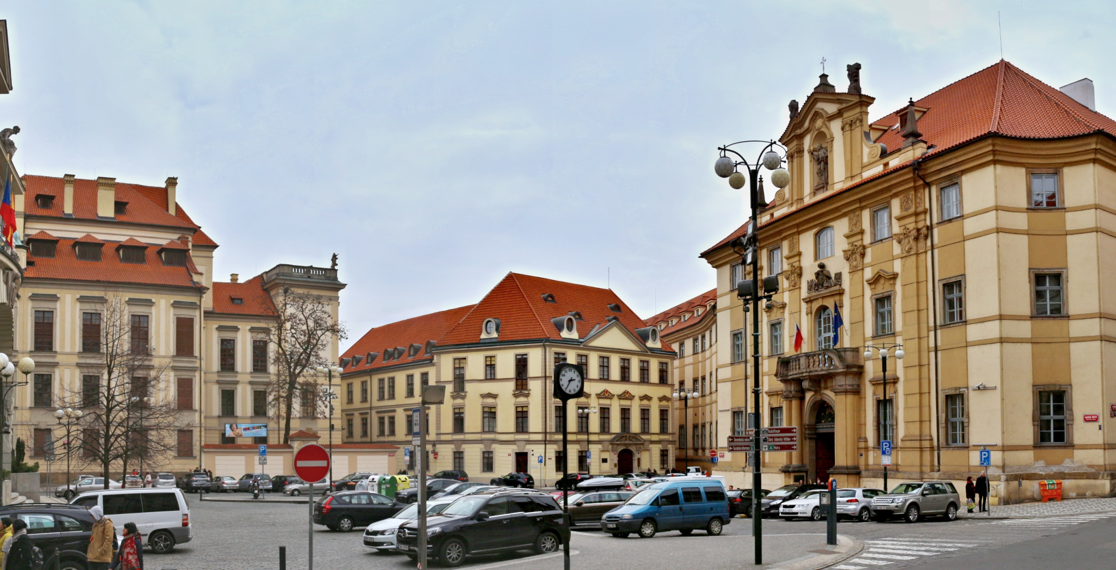 Praha Mariánské náměstí